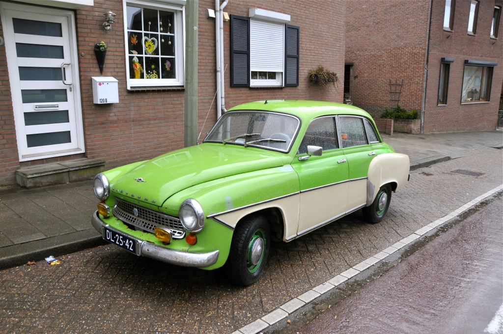 Bouwjaar 1965. Wartburg was een automerk uit het voormalige Oost-Duitsland. De merknaam Wartburg, naar het gelijknamige kasteel bij Eisenach (Thüringen), werd in 1899 al gebruikt voor een auto gebouwd door de Eisenacher Automobilfabrik. Wartburg probeerde, net als Trabant, al in een vroeg stadium af te komen van de tweetaktmotoren. Er werd onder andere geëxperimenteerd met de Comotor wankelmotor, en zelfs een V6 tweetaktmotor werd geprobeerd. Ook motoren van andere fabrikanten als Renault werden geprobeerd, maar kosten en de Staat verhinderden de inzet van een van deze varianten. Ook de carrosserie was punt van discussie en ook hier probeerde men vergeefs te moderniseren. Ook samenwerking met onder andere Škoda liep uiteindelijk op niks uit. Pas in 1988 kwam een modernere variant met Volkswagen viertaktmotor, maar dit bleek te laat. In 1989 viel de muur en binnen een paar jaar zou Wartburg productie compleet stopzetten. Een deel van de fabriek werd door Opel gekocht en nog immer gebruikt. Bron: Wikipedia